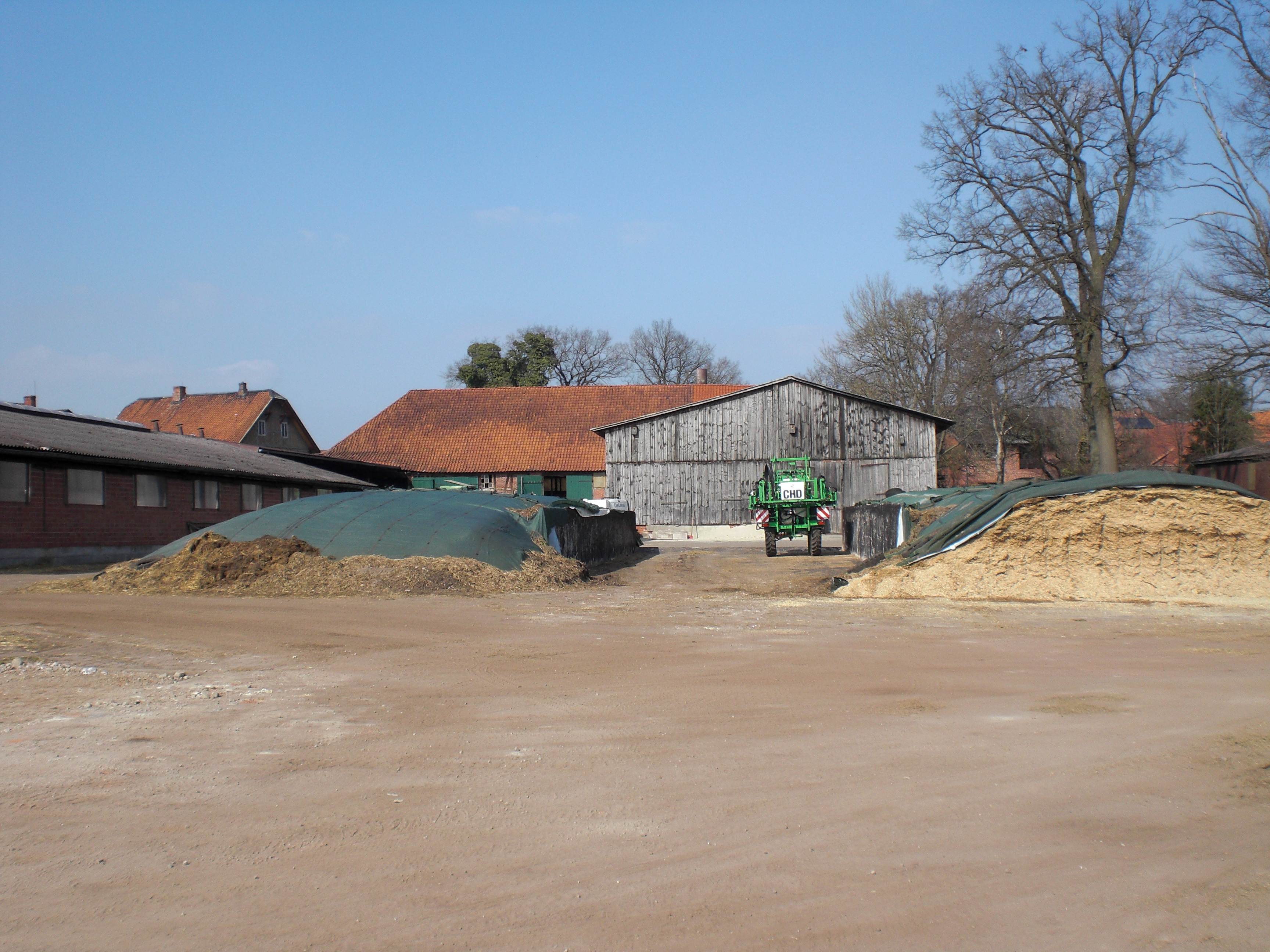 Ummern